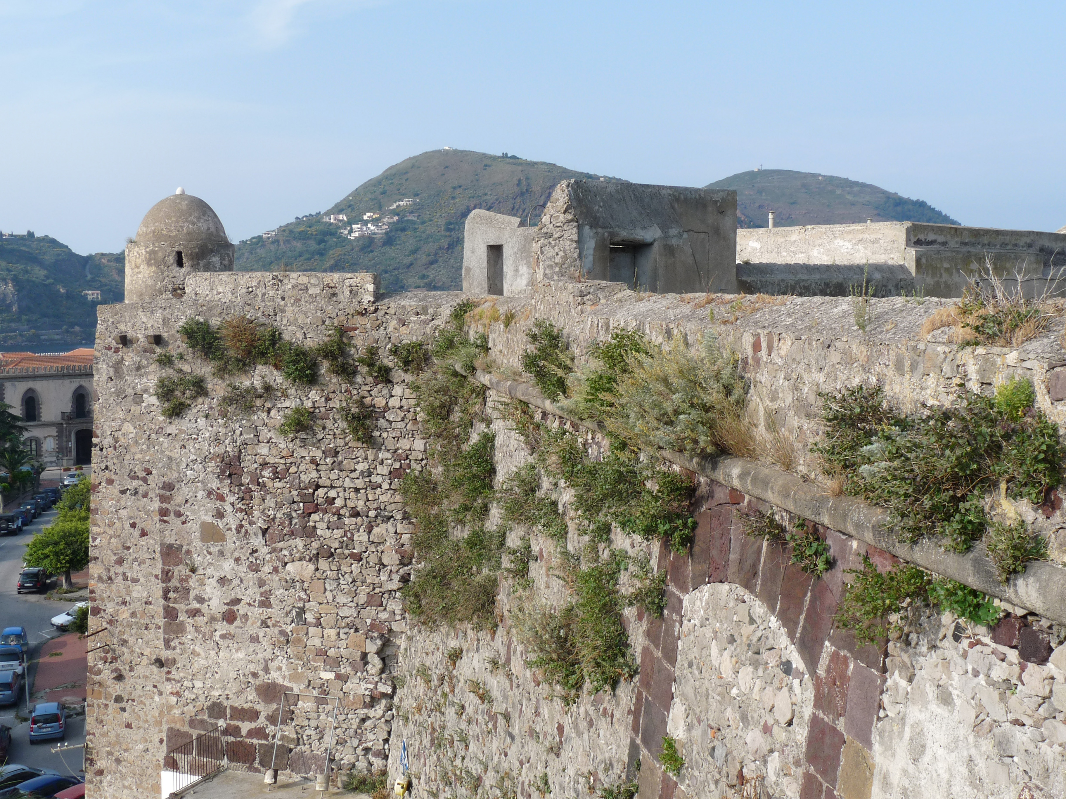 Enceinte de la citadelle de Lipari (îles Eoliennes, Sicile)